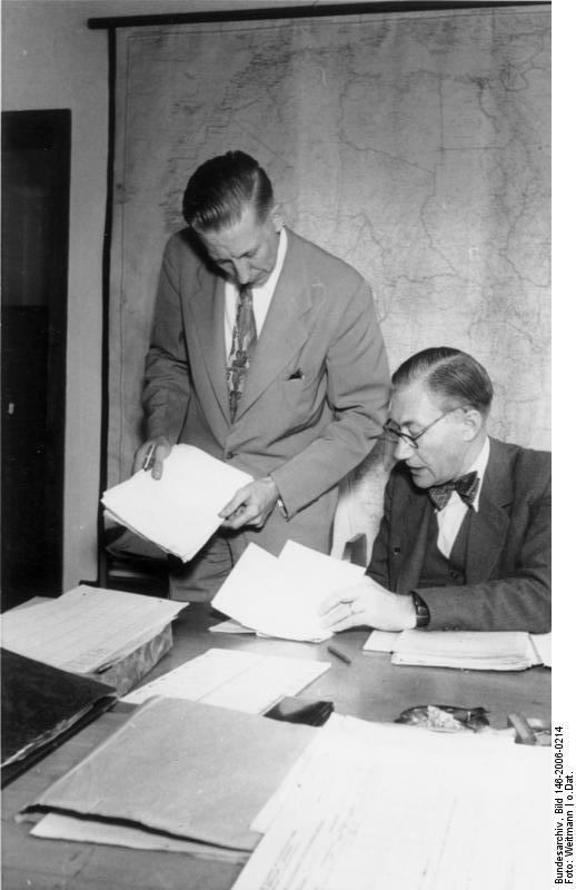 l. Gerhard Dietrich amerikanischer Theologe in Stuttgart